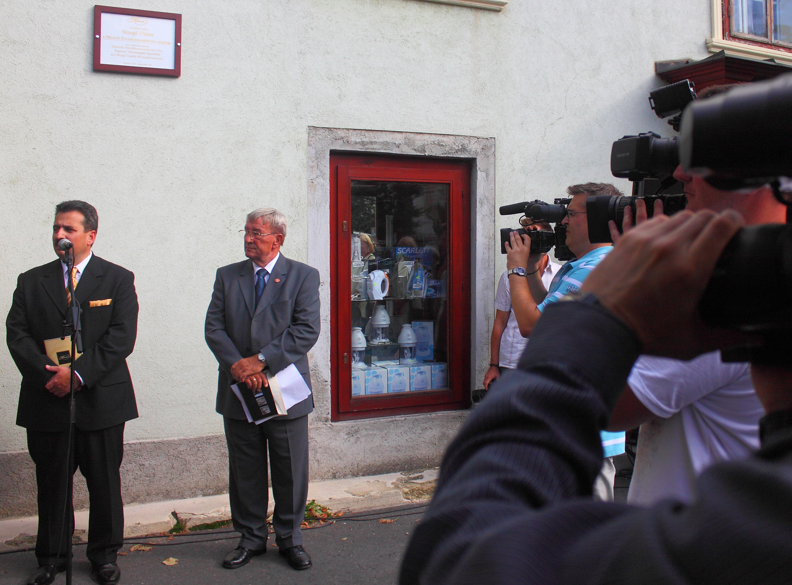 Dr. Simon Attila, a Herendi Porcelánmanufaktúra Zrt. igazgatója beszédet mond Stingl Vince emléktáblájának avatása Sopronban, egykori szülőházánál, 2012. szeptember 28-án.